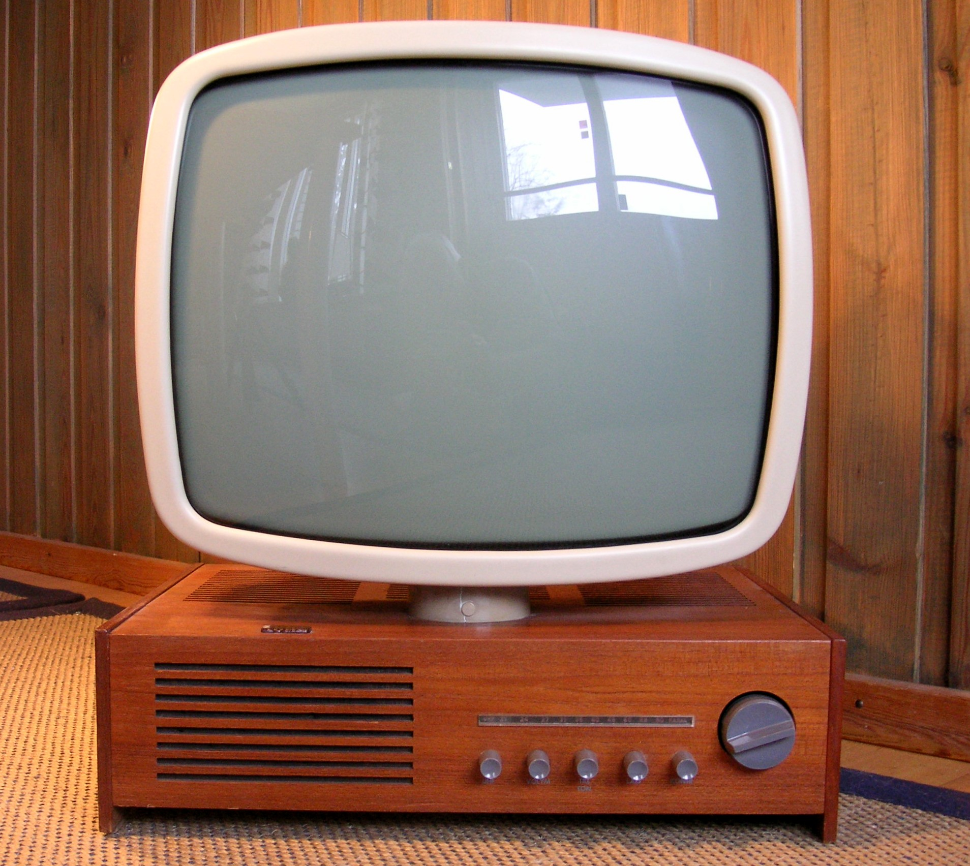 Stig Lindbergs vridbara TV "Lumavision"